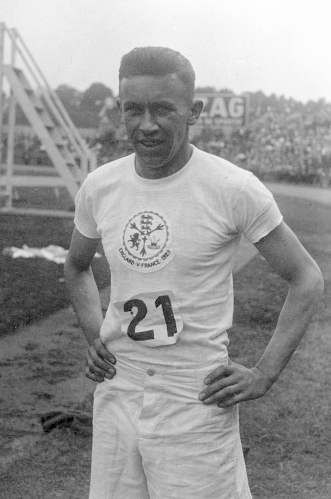 Colombes : France-Angleterre, athlétisme : Thomas (portrait à 3 m) : [photographie de presse] / Agence Meurisse